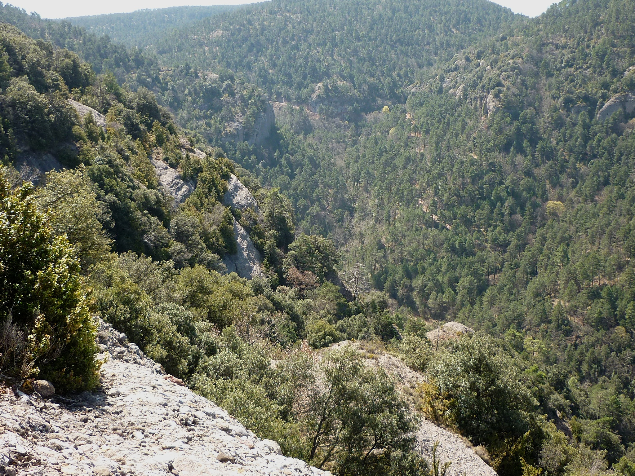 Rasa de cal Catriques: vista de la seva capçalera des del Canals. La Vall d'Ora (Navès -Catalunya)